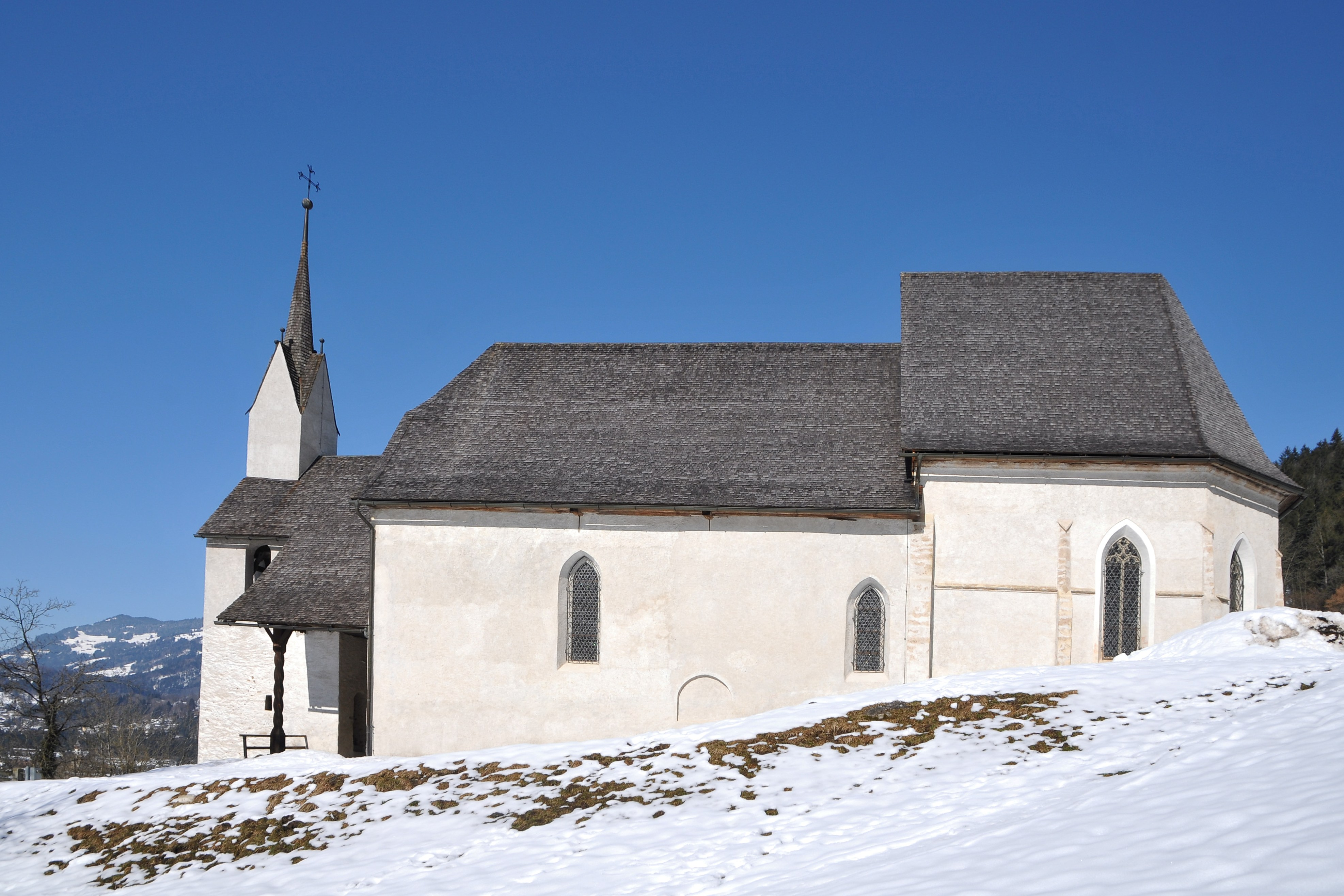 Alte Pfarrkirche hl. Martin mit ehem. Kirchhof an der St. Martinsweg 163 in Ludesch.